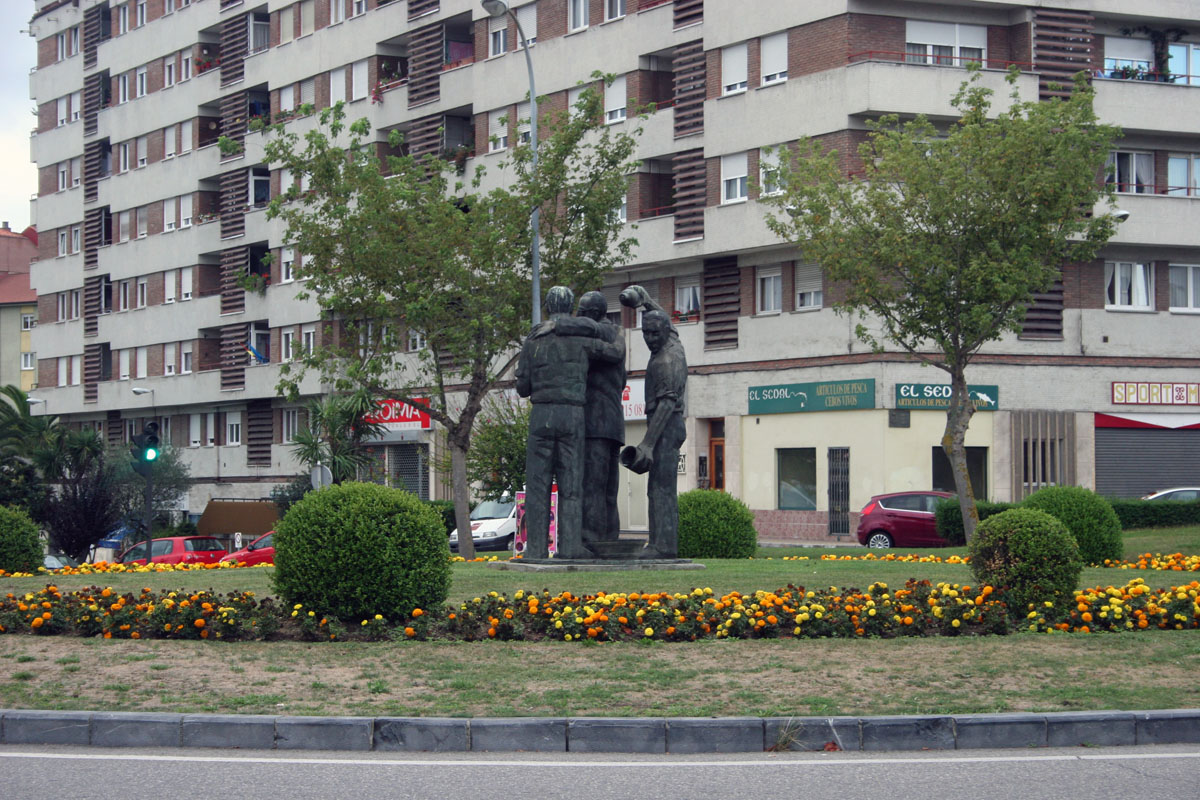 Escanciando sidra. Autor.- José Antonio Garcia Prieto "Llonguera". 1999. Barrio de Teatinos, Oviedo